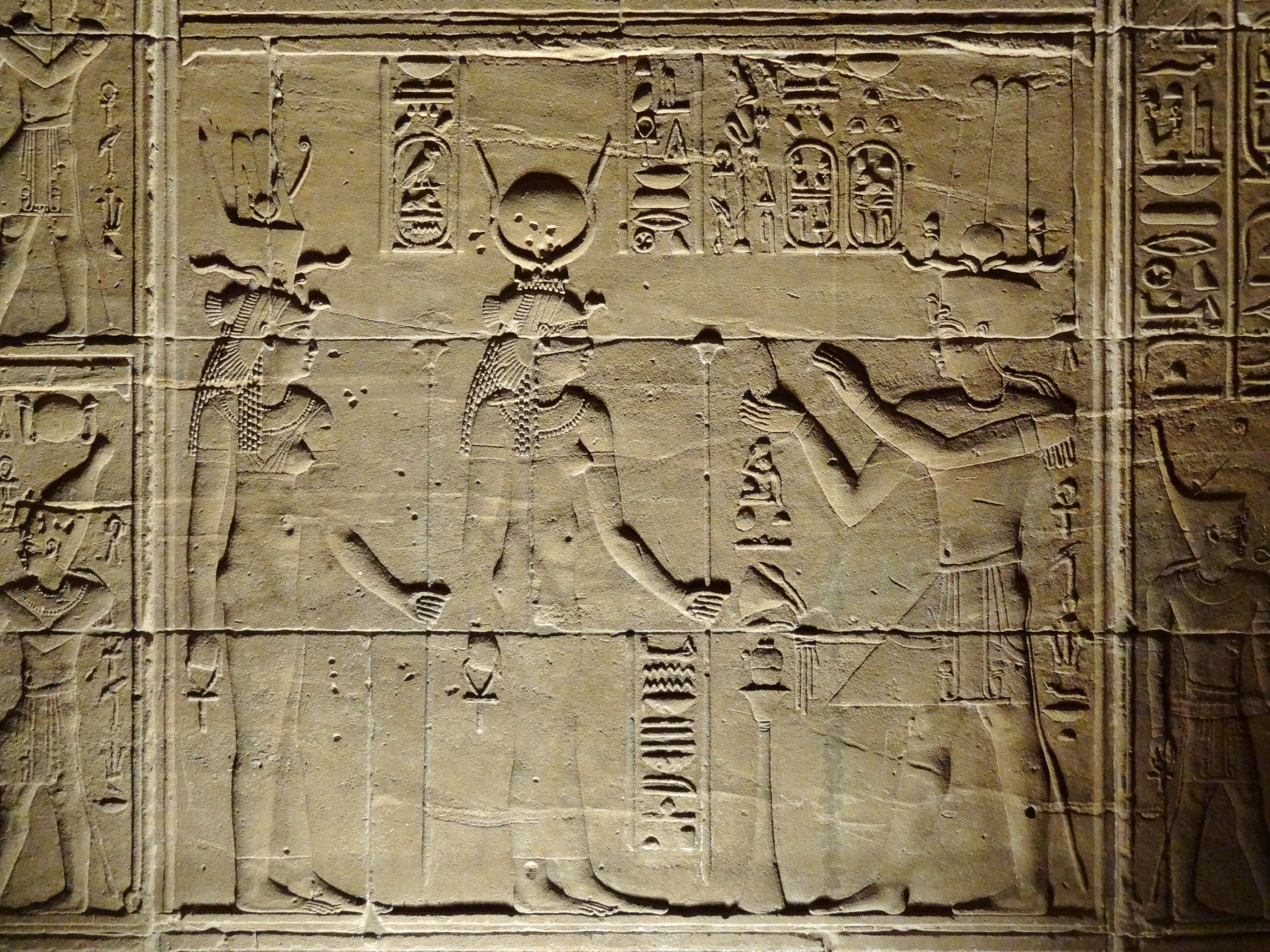 Die Göttin Isis zwischen Arsinoë II. und Ptolemaios II., Relief im der Isis geweihten Tempel von Philae, Ägypten